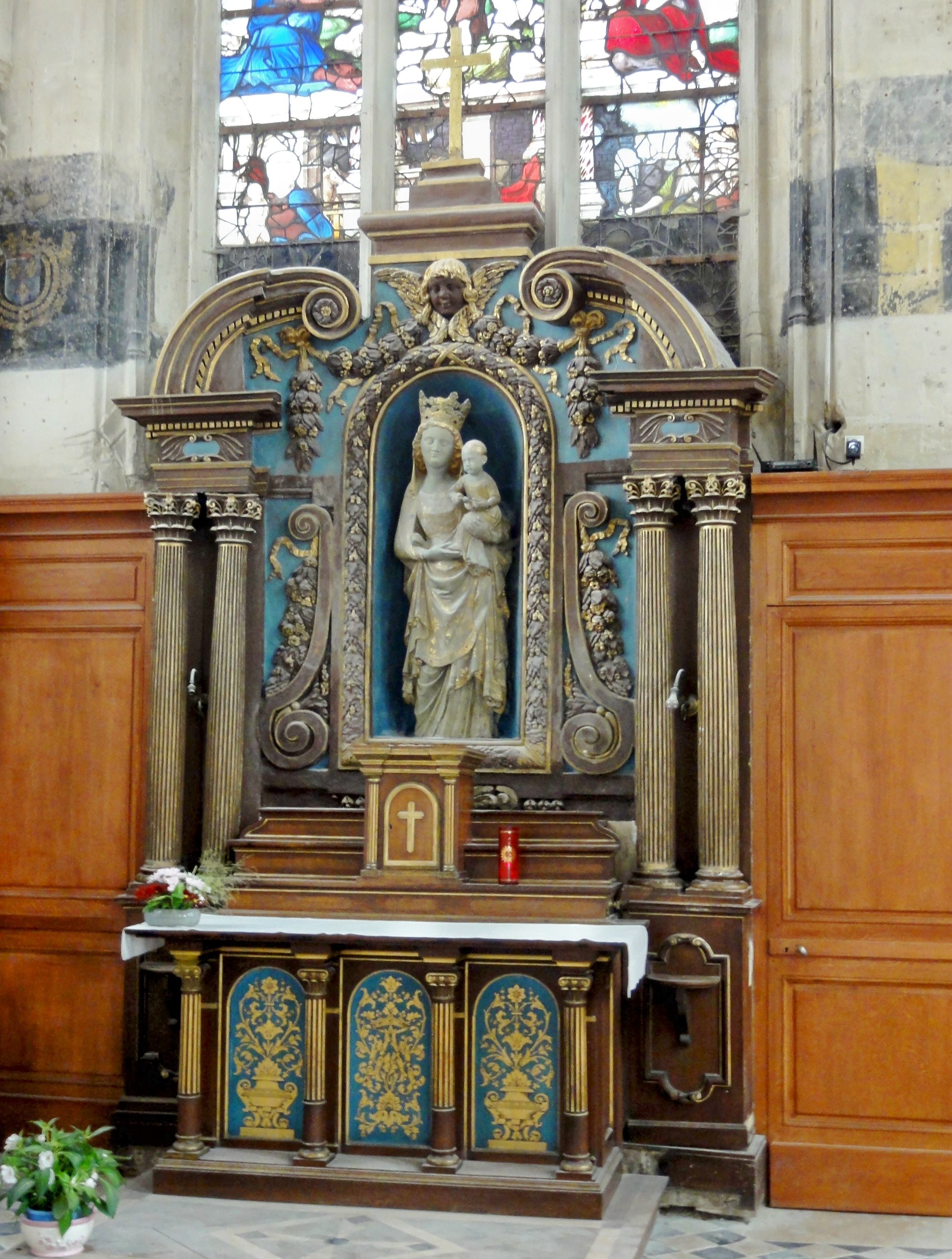 Retable de la chapelle de la Vierge (qui n'est autre que l'extrémité orientale du bas-côté), avec la Vierge à l'Enfant du XIVe siècle.